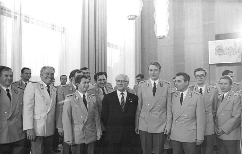 Berlin, Militärakademie- Absolventen, Empfang ADN-ZB Mittelstädt 19.10.81 Berlin: Absolventen- Der Generalsekretär des ZK der SED, Erich Honecker, Vorsitzender des Staatsrates und des Nationalen Verteidigungsrates der DDR, empfing die Absolventen der Militärakademien. Links: Armeegeneral Heinz Hoffmann